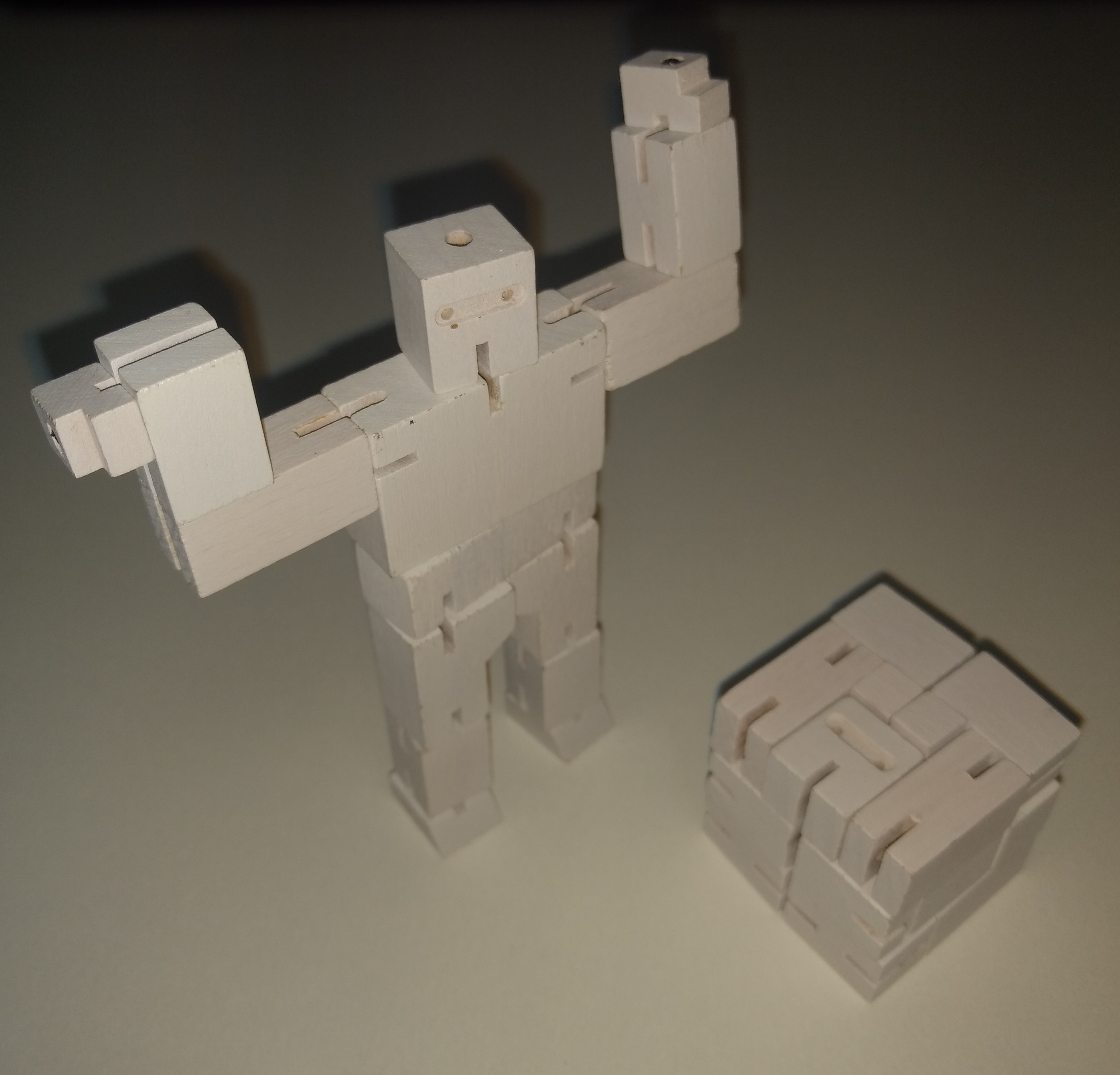 puzzle en bois sous forme de cube, déplié, il représente un homme ou un robot, le remettre sous forme de cube peut être compliqué.